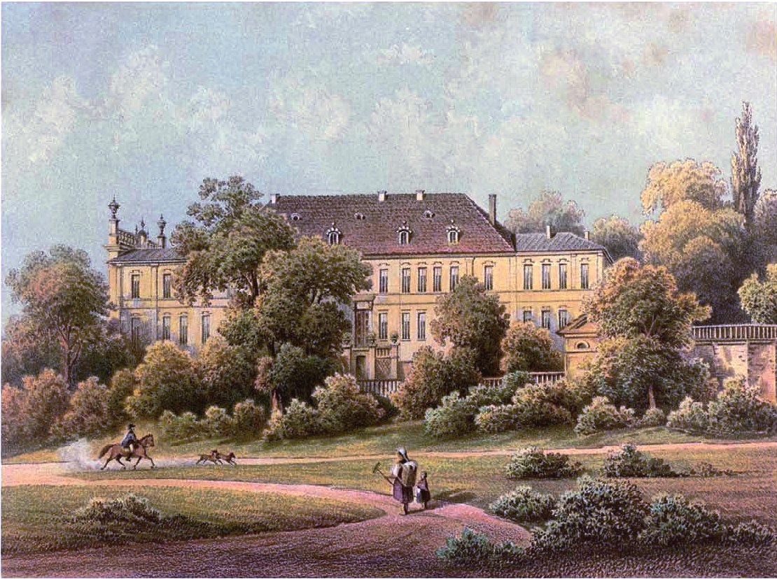 Schloss Golßen, Lithografie aus dem 19. Jahrhundert. Das 1945 untergegangene Schloss war u.a. zeitweise Wohnsitz von Susanne Sophie Marie Louise le Duchat von Dorville (1758-2.09.1808 Golssen), Mutter von Friedrich August Ludwig von der Marwitz (1777-1837).